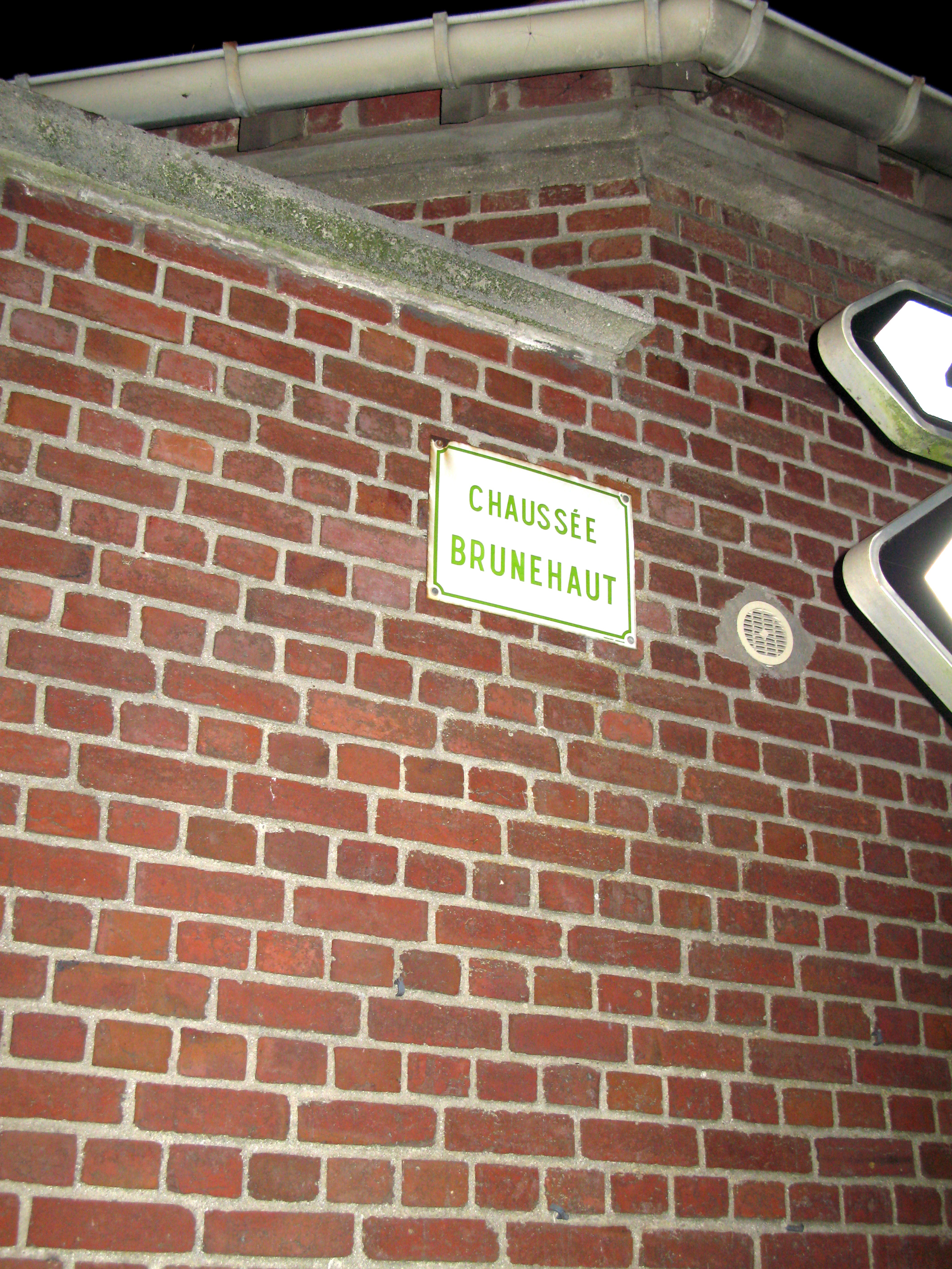 Estrées-Deniécourt (Somme, France) - Plaque dans la rue traversant le village, "Chaussée Brunehaut", sur le côté droit en direction d'Amiens.